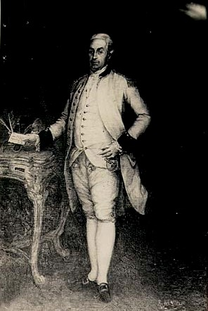 Reprodución fotográfica del retrato del Cnel. don José Ignacio de Merlo (1744-1814).